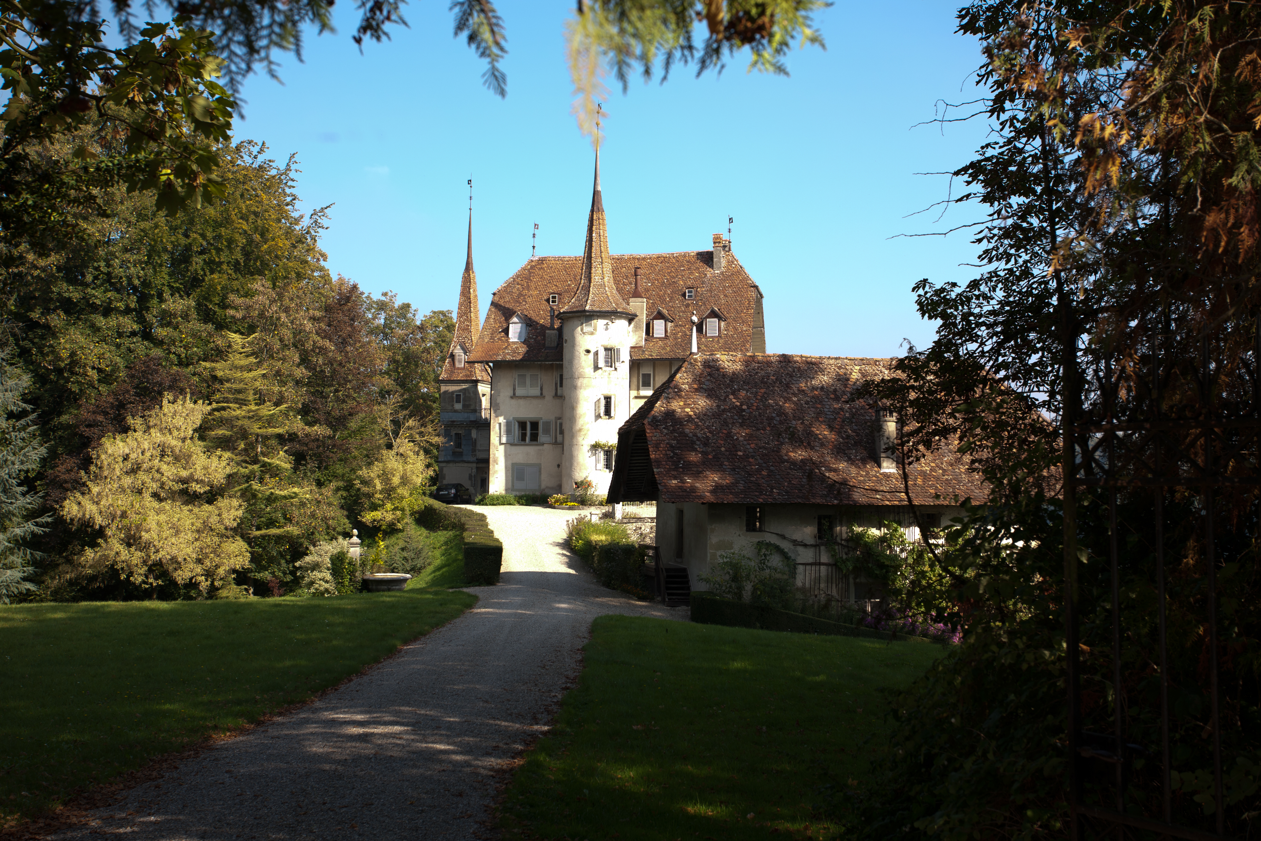 Barbareche de Grand Vivy